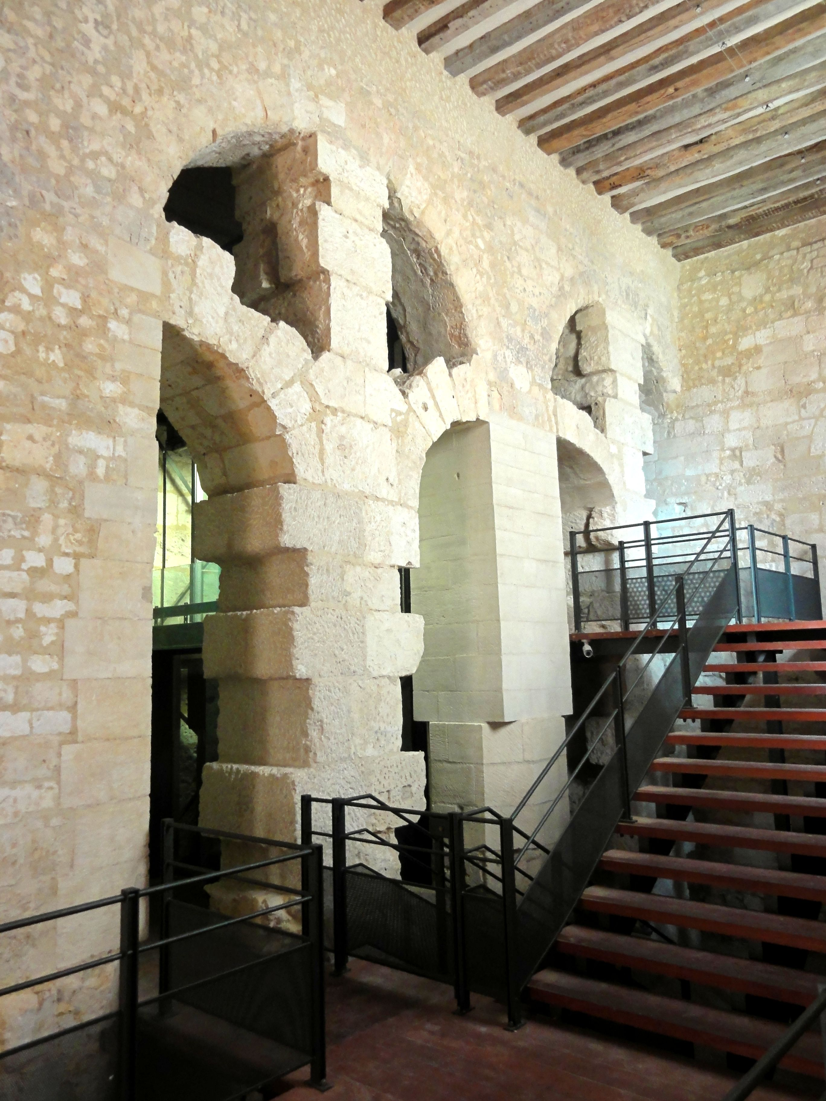 Bas-côté sud, 4e à 6e travée, grandes arcades consolidées.